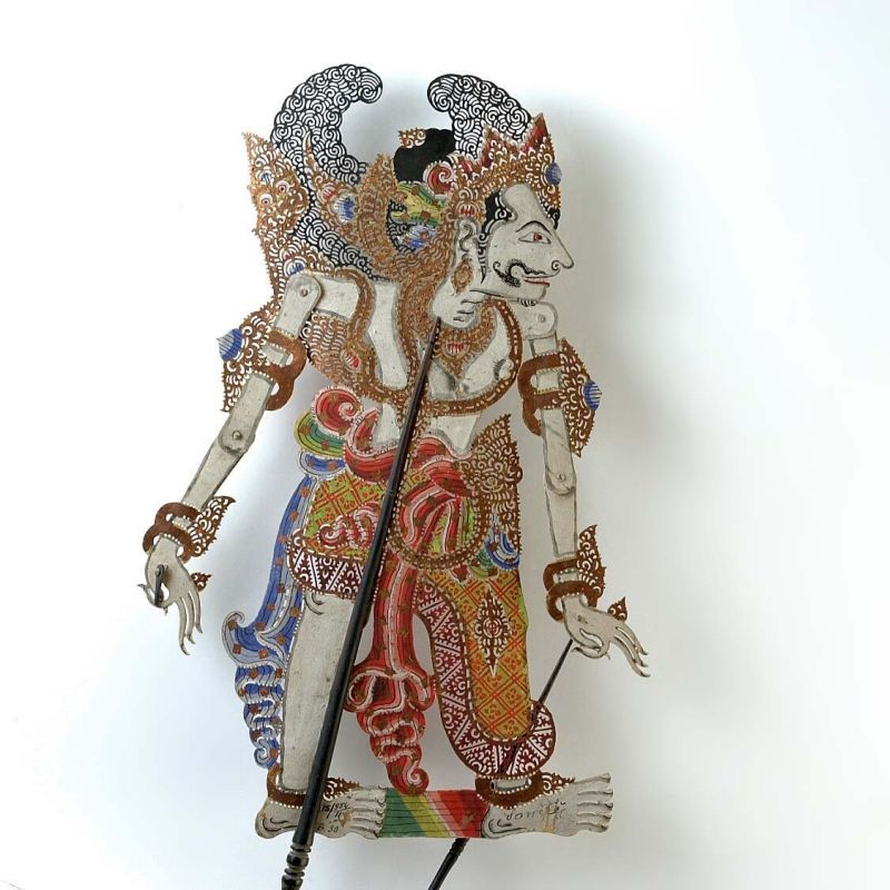 Schaduwfiguur. Wajangfiguur voorstellende Soweta Unknown language: Wayang purwa